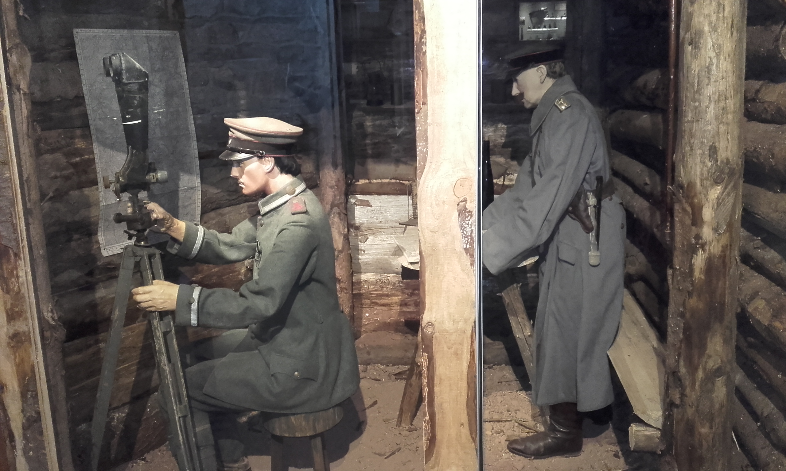 Haut-Rhin, Orbey, Muséographie Musée-Mémorial du Linge : militaires dans les tranchées.